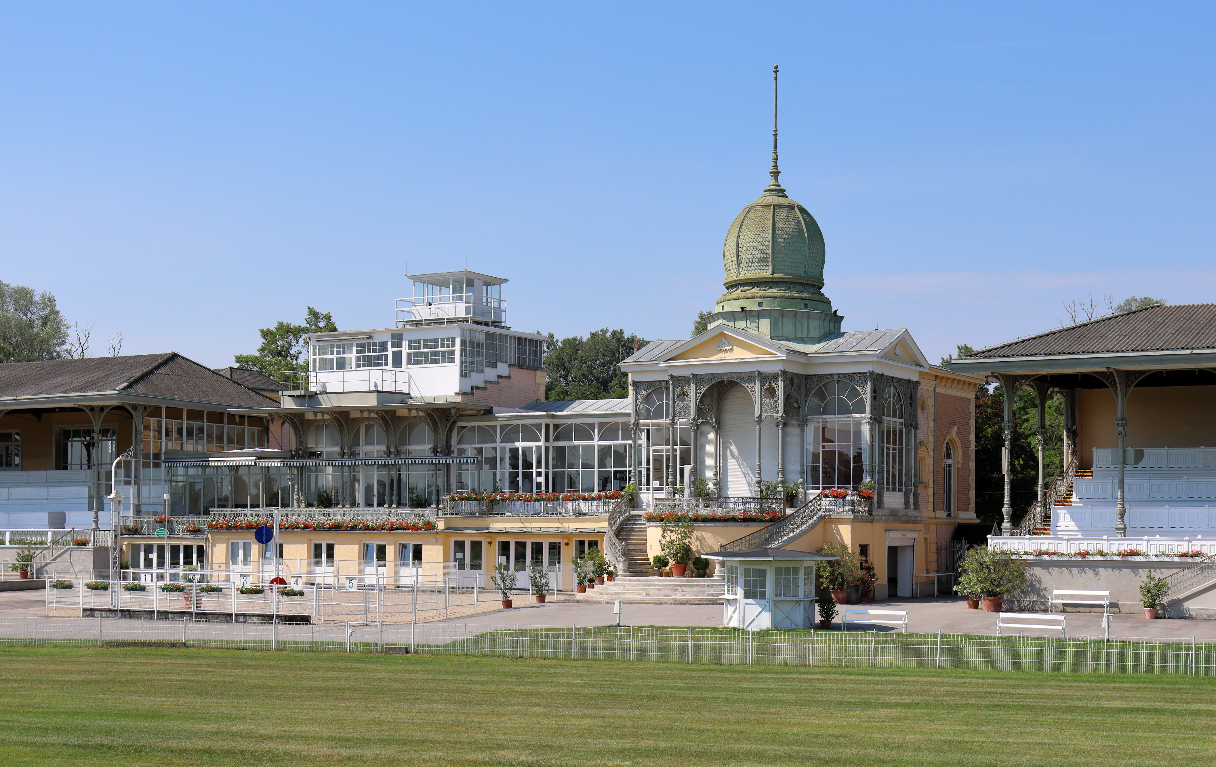 Die Hof-Tribüne der Galopprennbahn Freudenau im 2. Wiener Gemeindebezirk Leopoldstadt. Die Galopprennbahn ist eine in der Freudenau 1839 eröffnete Anlage. 1858 findet in Gegenwart von Kaiser Franz Joseph die Einweihung von 2 Tribünen statt, die nach Entwürfen des Ringstraßen-Architekten Carl Hasenauer von seinem Bruder, dem Hofzimmermeister Christoph Hasenauer, errichtet wurden. 1870 erfolgte die Einweihung der „Hof-Tribüne“, die aus der „Hof-Loge“, der Clubloge und der „westlichen“ Tribüne besteht, und vom Budapester Architekten Adolf Feszty (1846–1900) entworfen wurde. 1883 zerstörte ein Brand teilweise die Tribünen. Für die Wiederinstandsetzung wurde der Architekten Josef Drexler beauftragt. Im Anschluss wurden nach seinen Plänen bis 1887 auch noch das Totalisator-Gebäude, das Verwaltungs- sowie Stallgebäude errichtet. 1967 kaufte der Staat um 7,6 Mio. Schilling die Gebäude auf dem Rennplatz. Von 1983 bis 1986 fand eine aufwendige Renovierung der Tribünenanlage statt. 1991 Gründung der IRM-Interrace Rennbahn Management Ges.m.b.H., die die Anlage mit den Stallungen „verwaltet“. De facto finden keine Rennen mehr statt. Die Hoftribüne wird für Events aller Art genutzt und die Rasenfläche innerhalb der 2.800 km langen Rennbahn als Golfplatz.